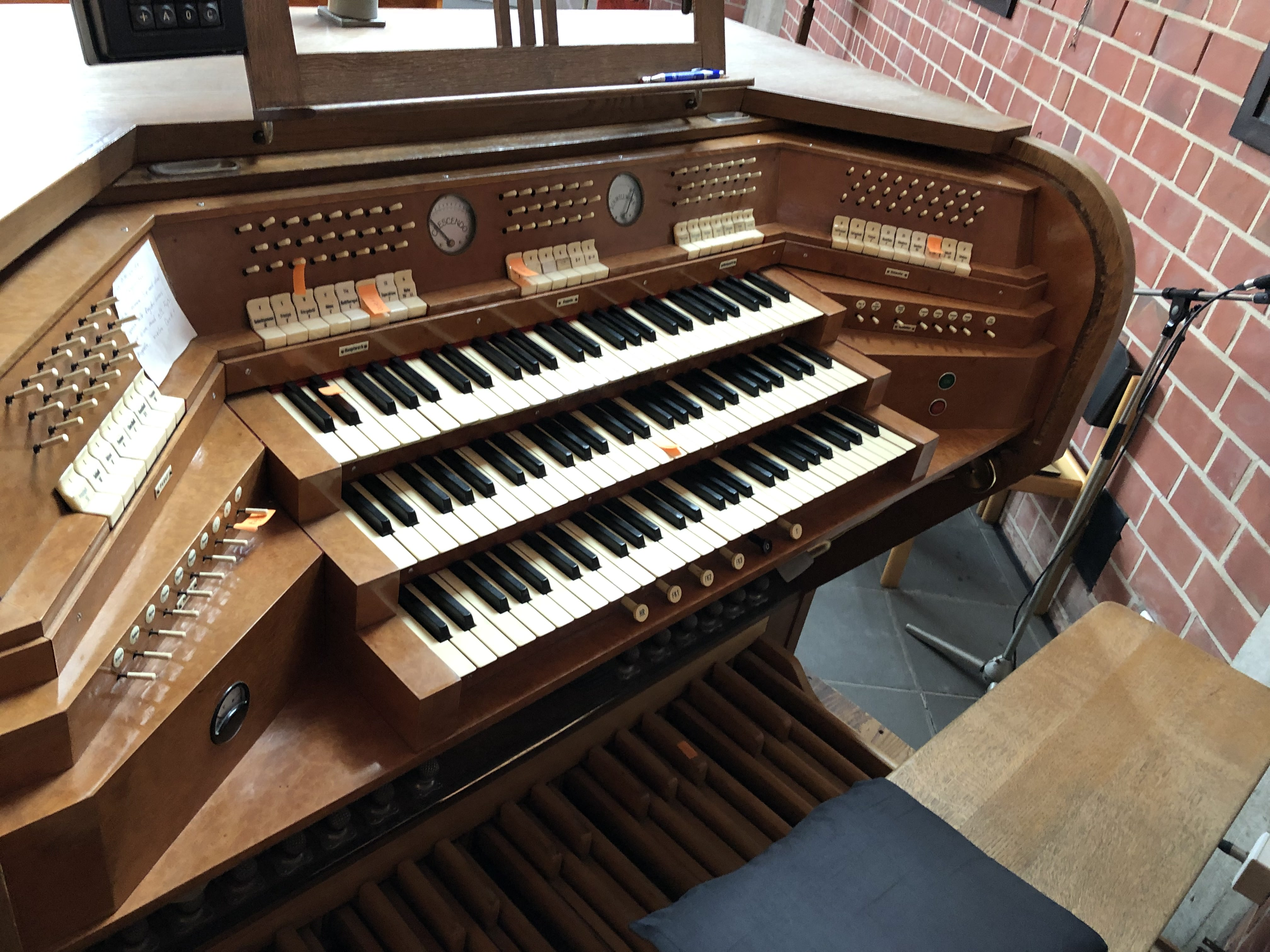 Spieltisch der Orgel vor dem Umbau